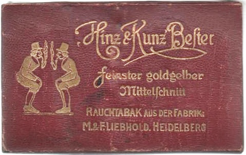 Tabakschachtel (um 1910) der jüdischen Heidelberger Tabakfirma M u. F Liebhold